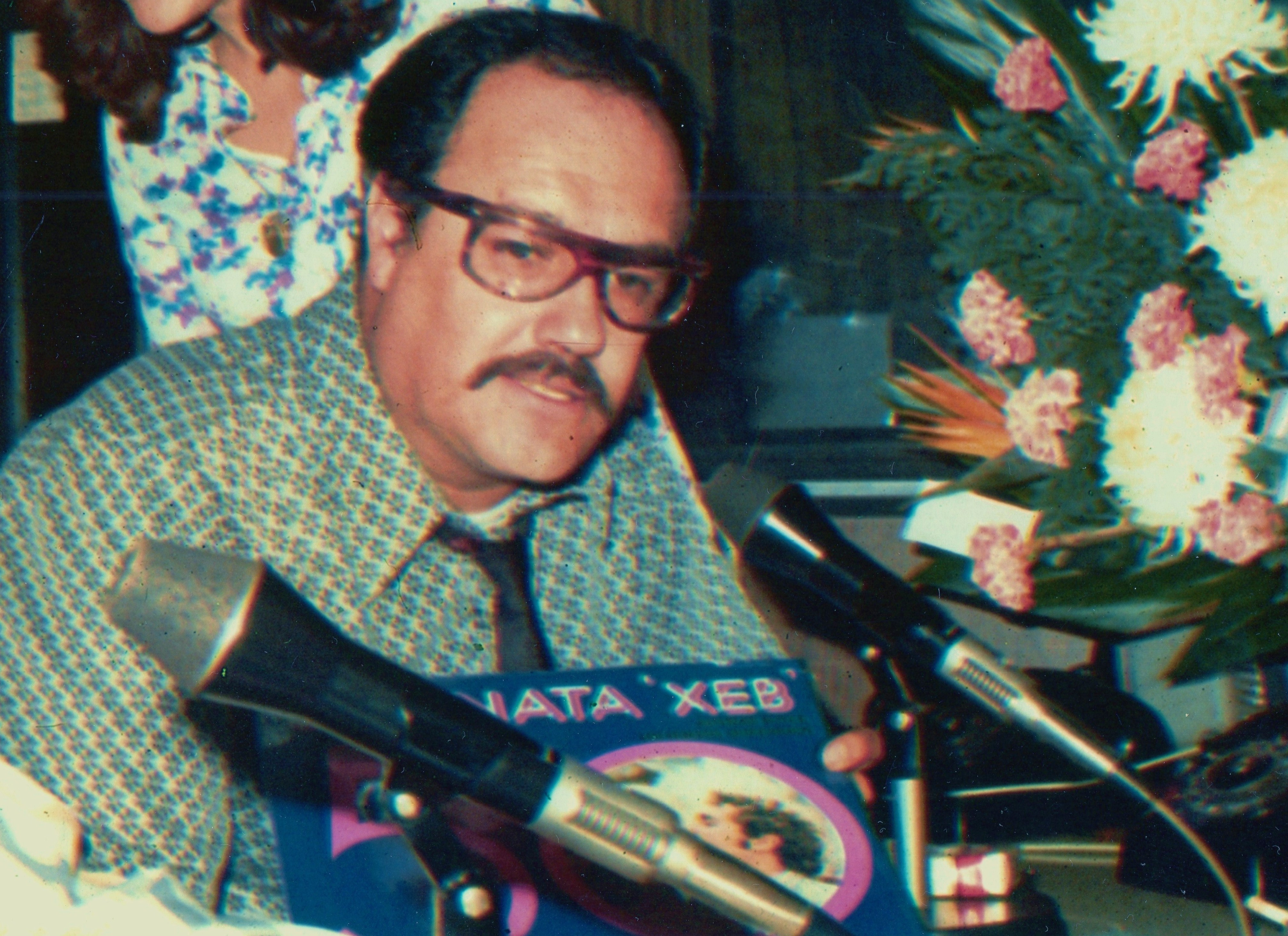 Conmemorando el 50 ° de XEB, al frente del programa "Serenata, XEB" 1973.